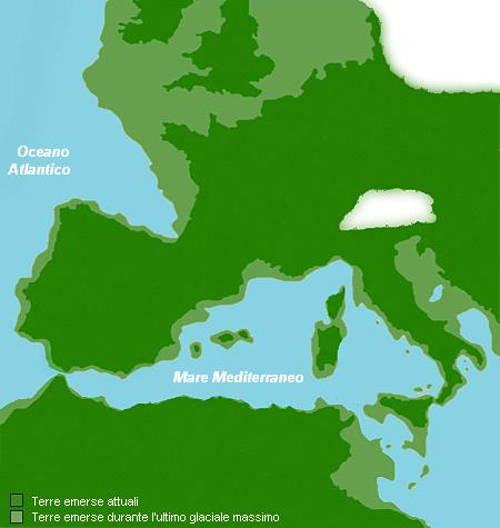 Translation of Jaakausi.jpg